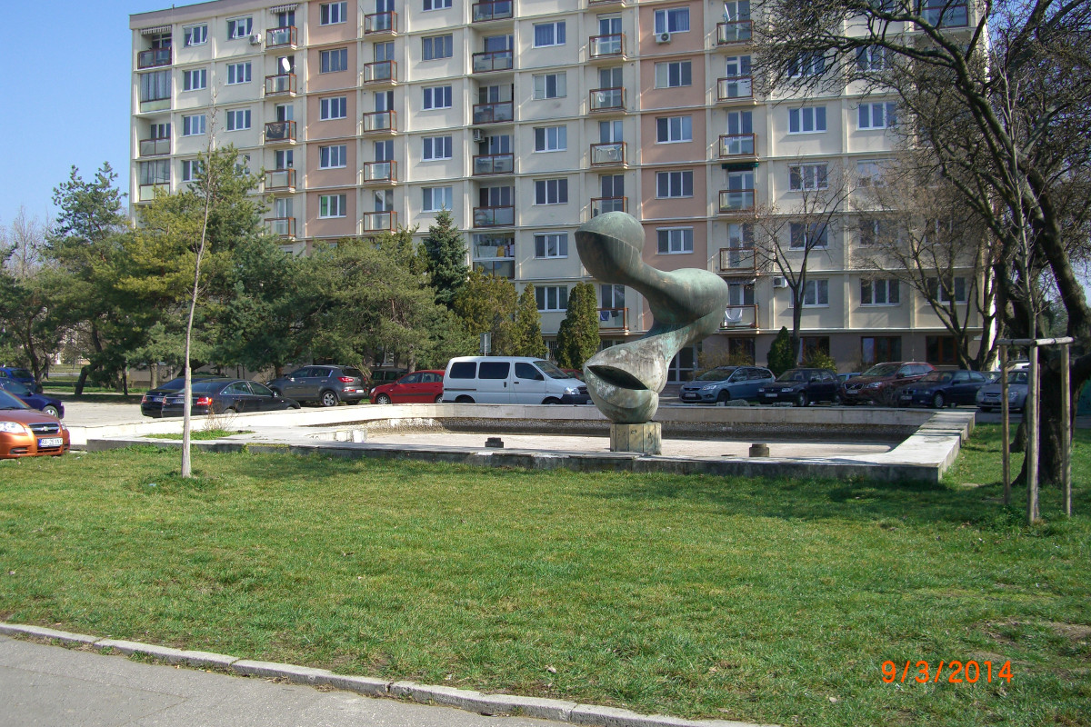 Fontana Puk Lipy, Bratislava/Ruzinov/Posen